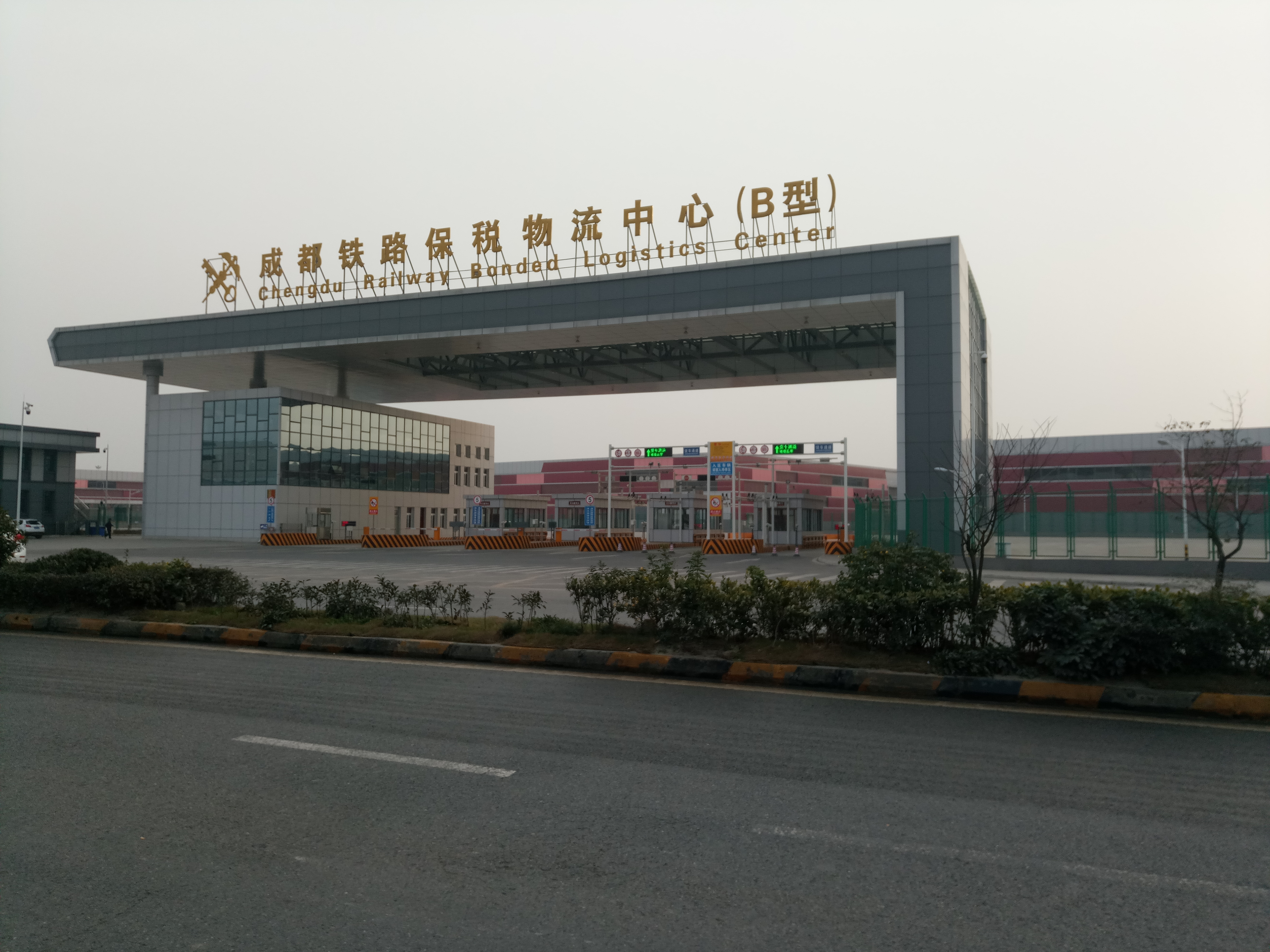 中文（中国大陆）: 成都自由贸易区保税物流中心